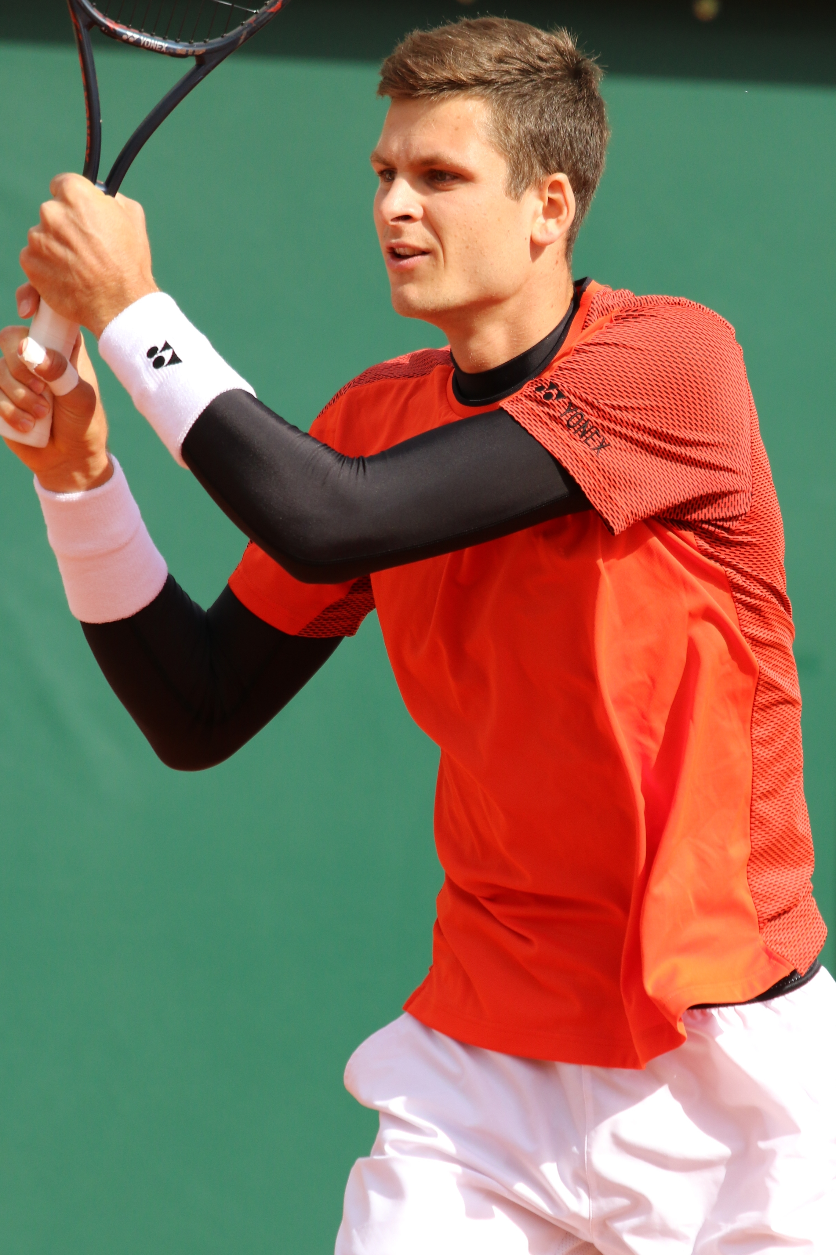 Hurkacz RG19 (10)